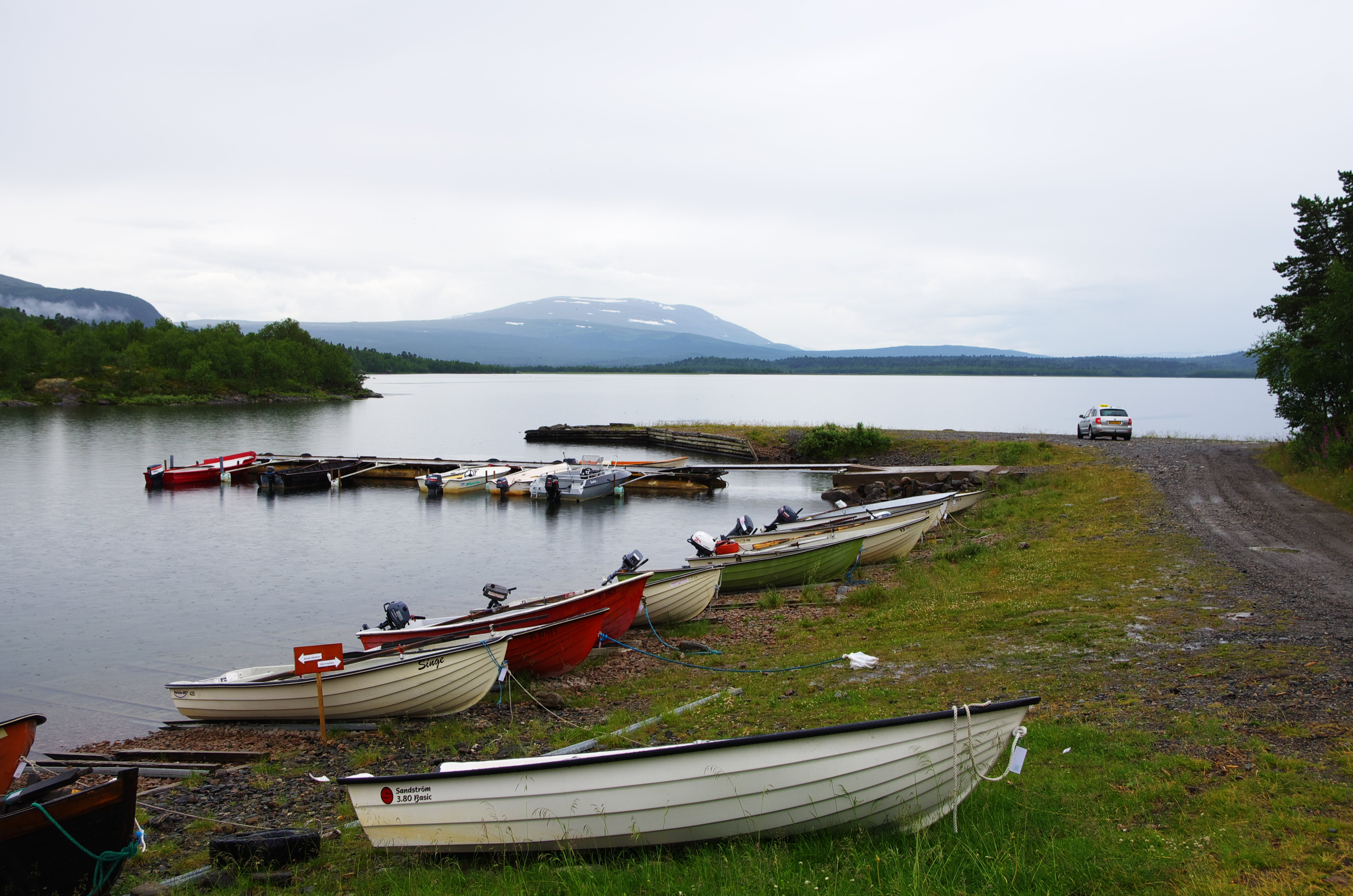 Sjön Iraft i vid Adolfström i Arjeplogs kommun, Lappland i Sverige.